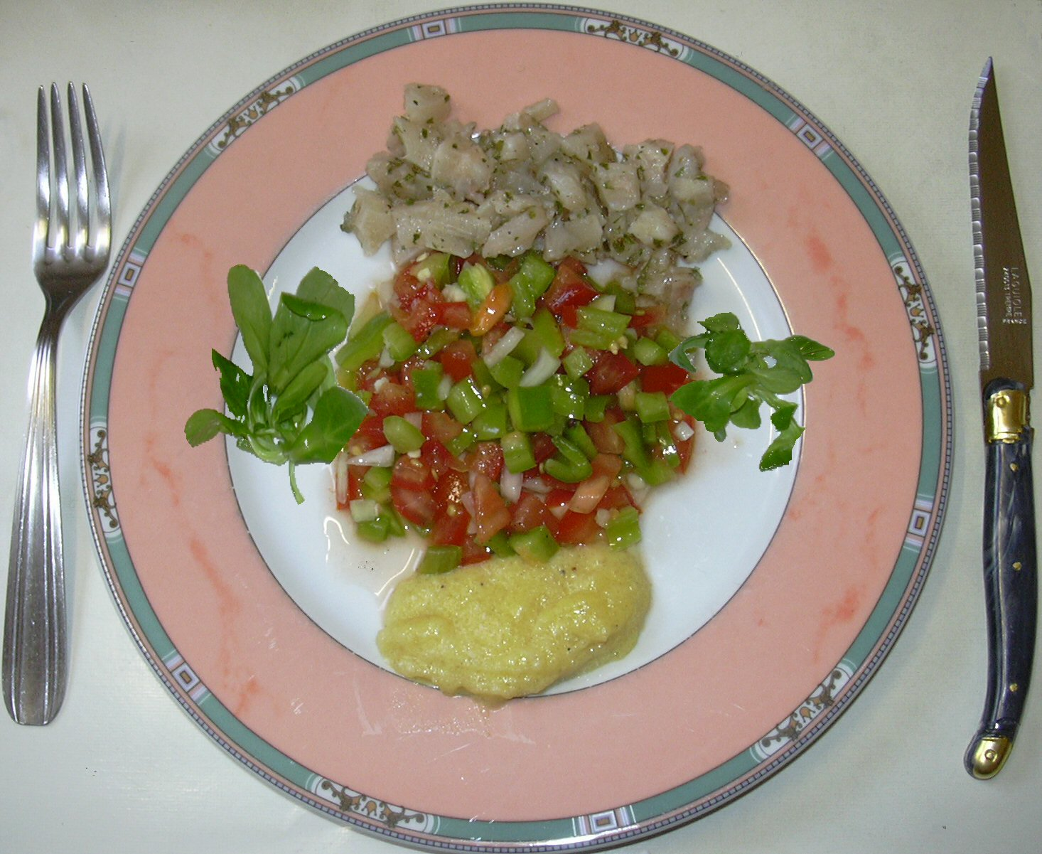 salade pied de veau